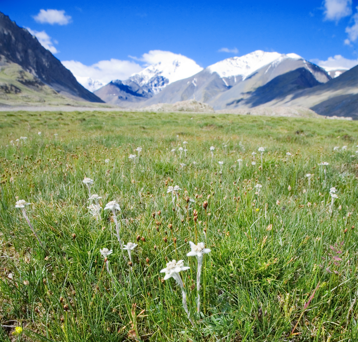 Эдельвес